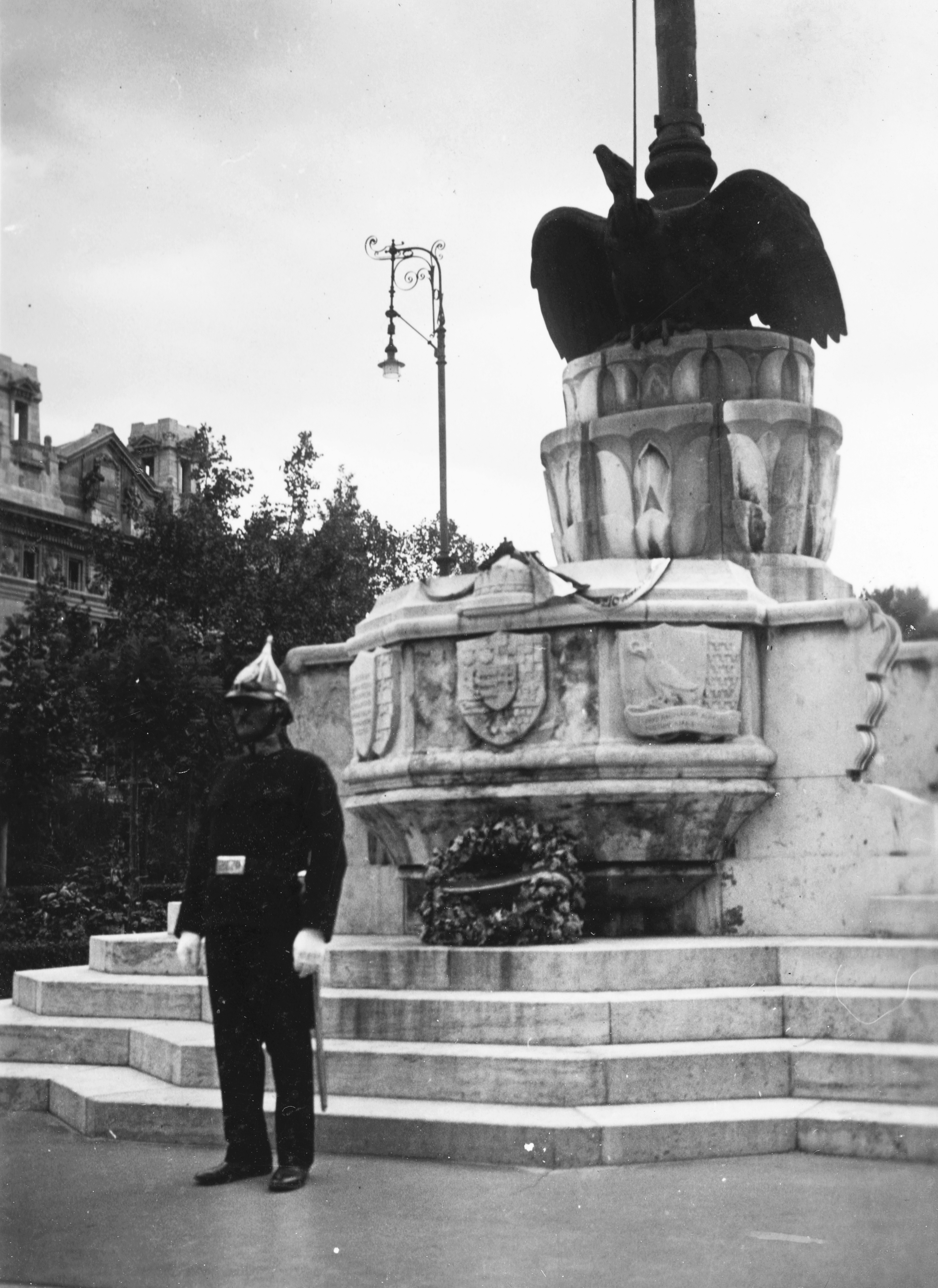 Szabadság tér, ereklyés országzászló talapzata. Location: Hungary, Budapest V. Tags: Budapest Title: Szabadság tér, ereklyés országzászló talapzata.